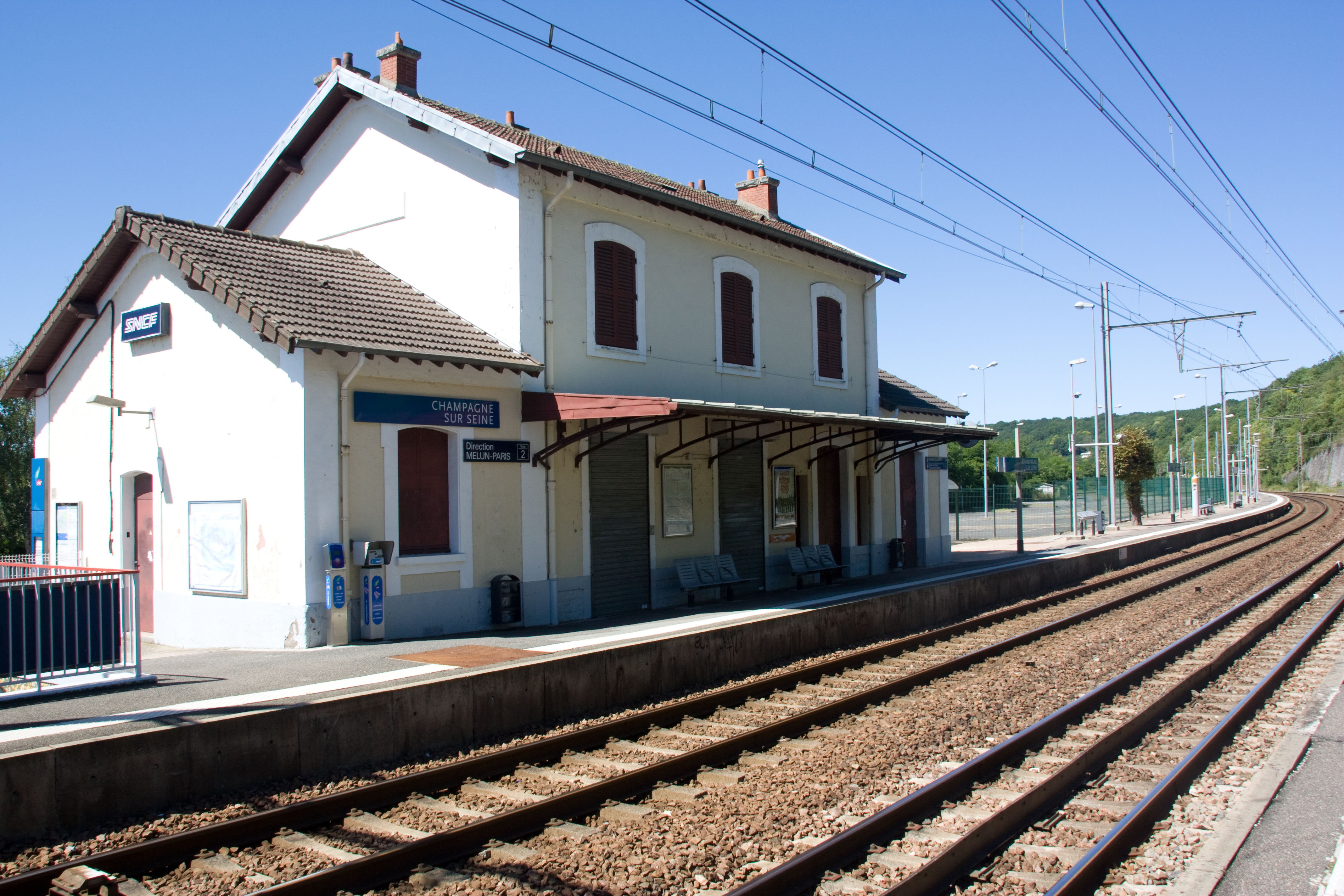 Gare de Champagne-sur-Seine, Champagne-sur-Seine, Seine-et-Marne, France